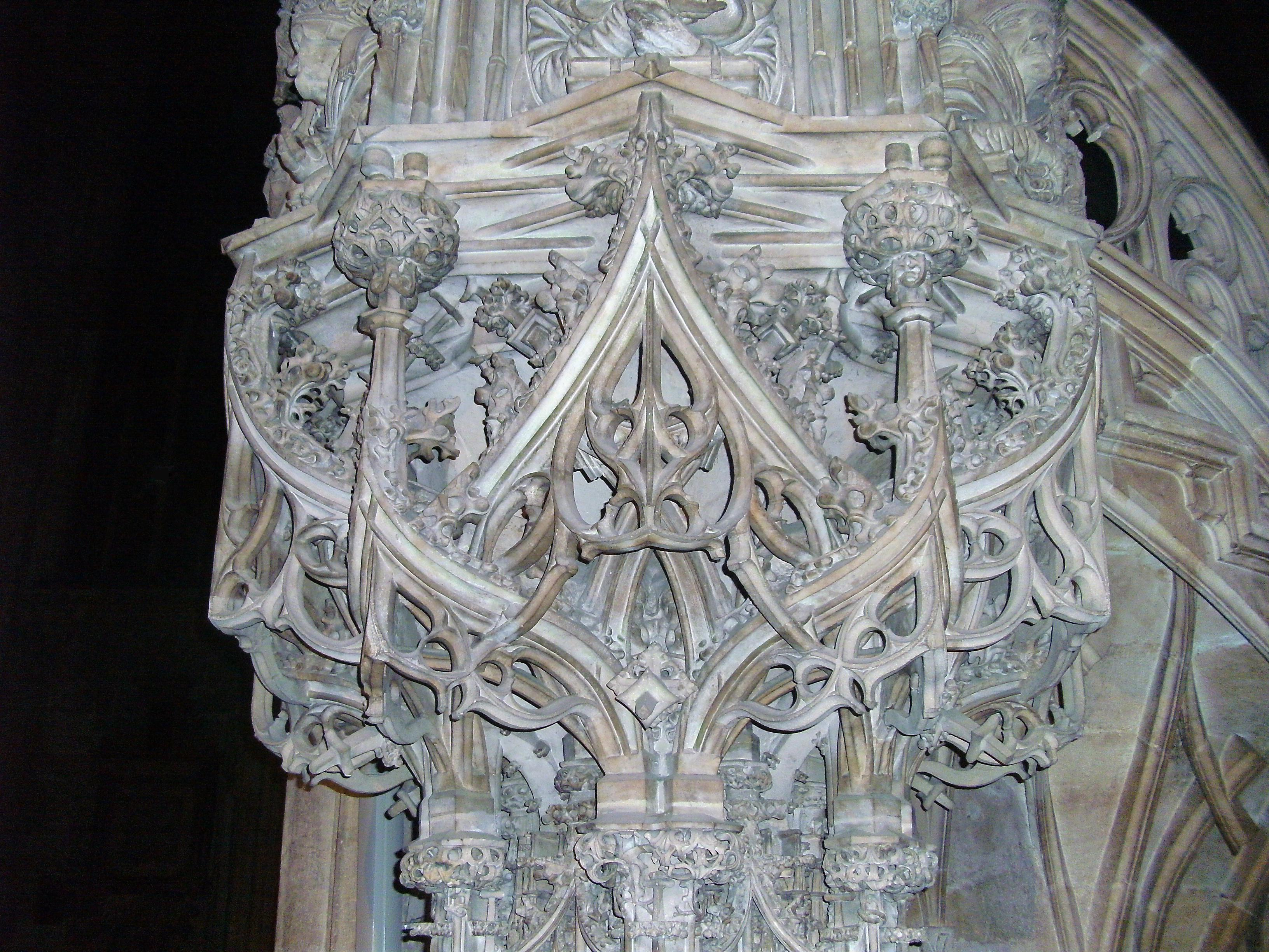 Steinblüte in der Kanzel des Stephansdoms (Wien)